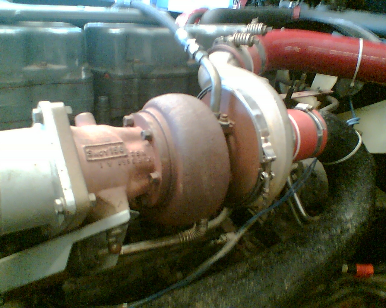 Turbocompresseur d'un Renaultl Magnum (Camion)